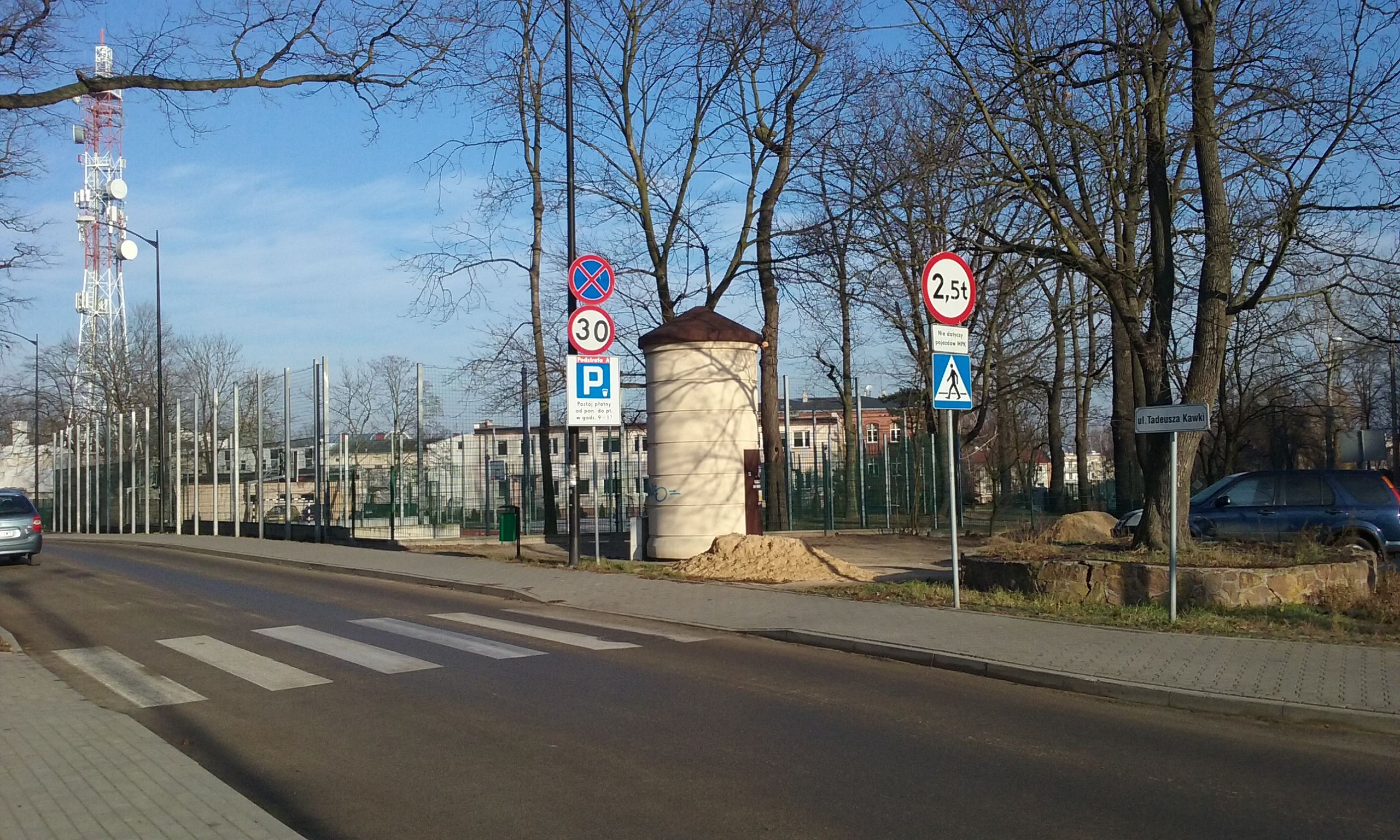 Tomaszów Mazowiecki w wojewodztwie łódzkim, PL,EU. CC0